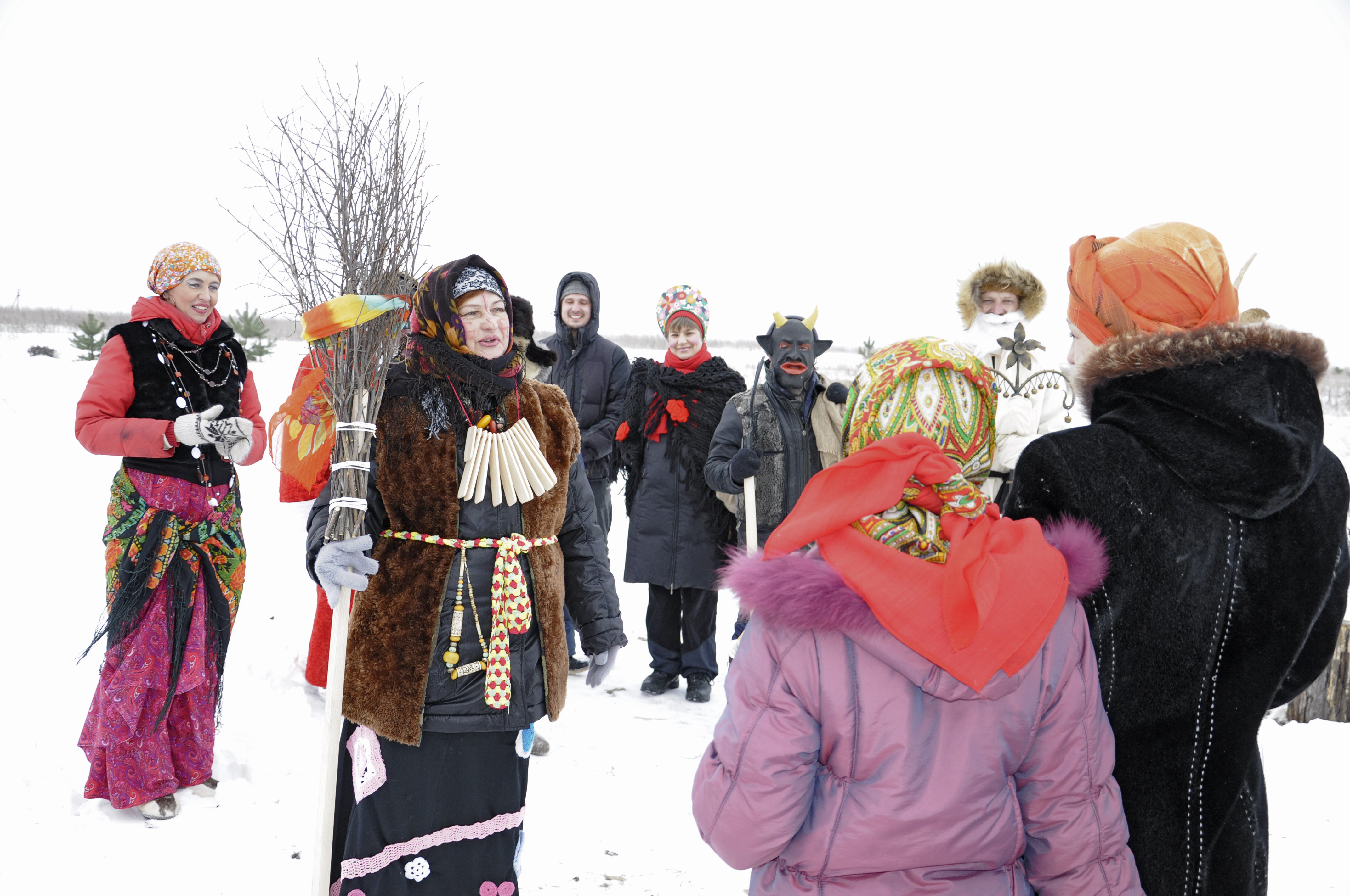 Колядки в родовом экопоселениии «Кореньские родники». Белгородская область, Россия, декабрь 2012 г.